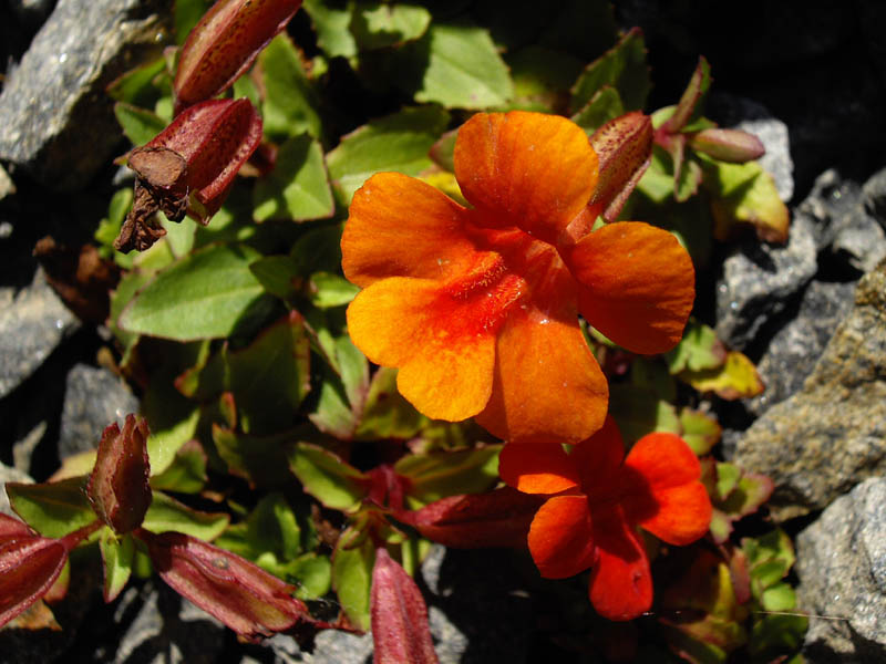 Mimulus cupreus